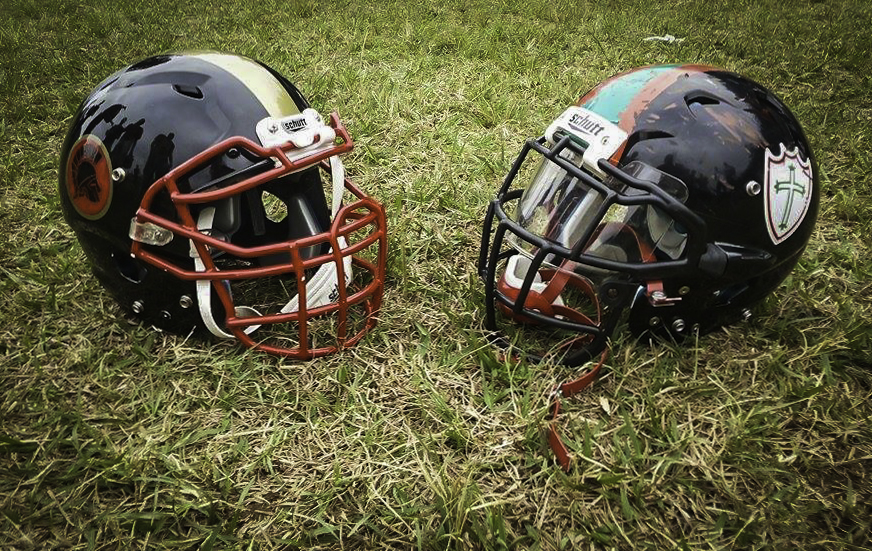 Simbolo de Parceria